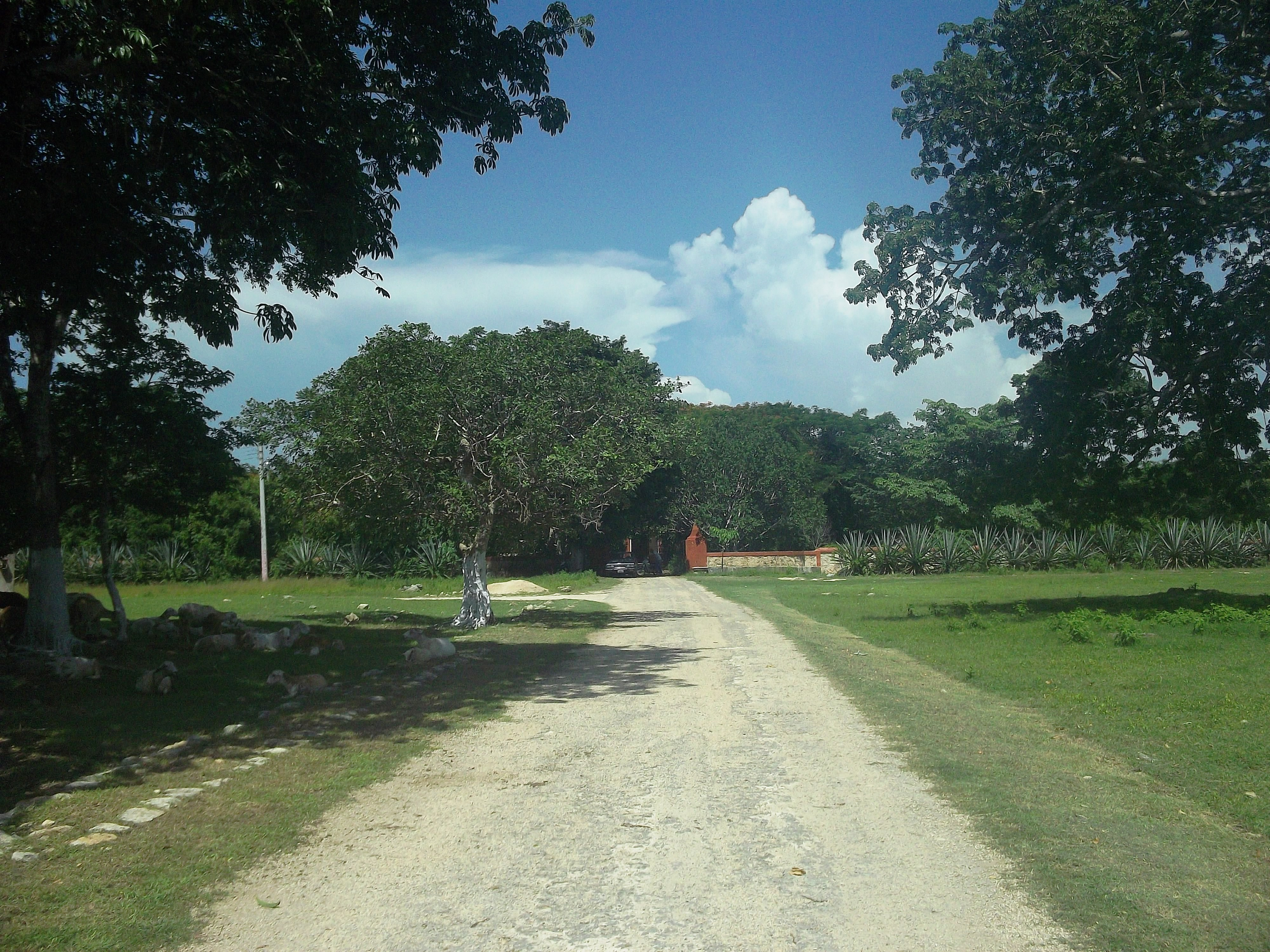 Vista de la hacienda Kacabchén Ucí, Yucatán.